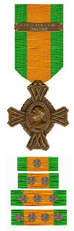 Eigen tekenwerk